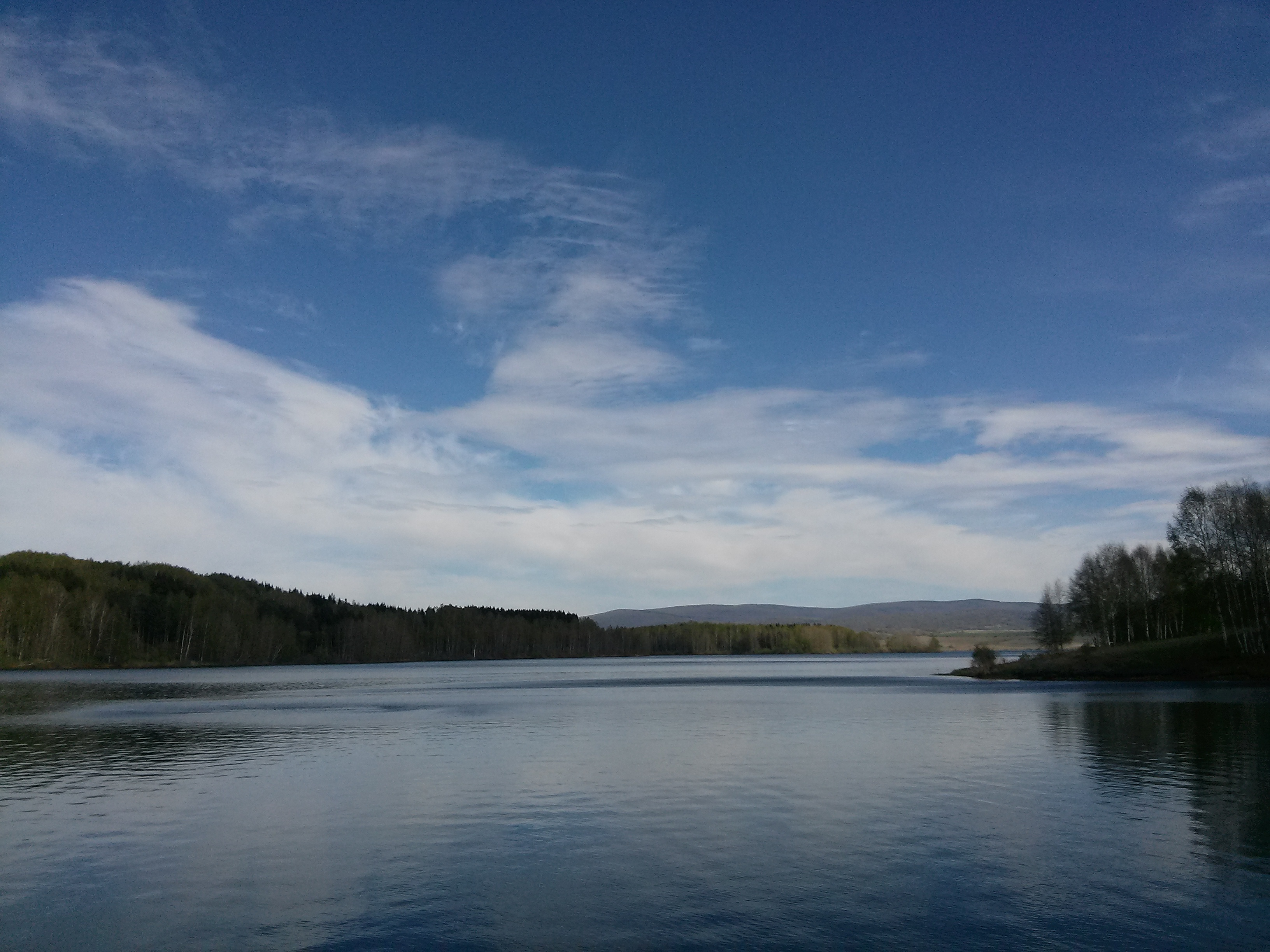 Srpski (latinica): Vlasinsko jezero